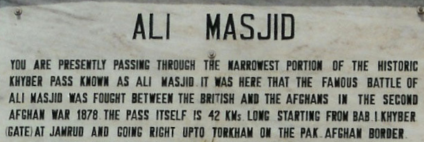 Memorial sign